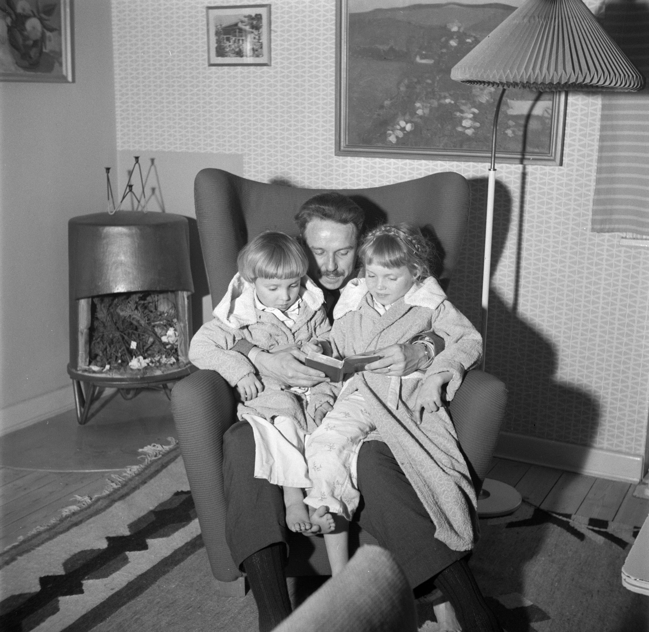 Collectie / Archief : Fotocollectie Van de Poll Reportage / Serie : Dag uit het leven van de familie Svendsen Beschrijving : Meneer Svendsen met zijn dochters op schoot, vermoedelijk het voorlezen voor het slapengaan Datum : maart 1954 Locatie : Denemarken Trefwoorden : boeken, dagelijks leven, dochters, gezinnen, huiselijkheid, huiskamers, huisraad, interieurs, kinderen, meubilair, ouders, thuis, vaders, woningen Persoonsnaam : Svendsen, [...] Fotograaf : Poll, Willem van de, [onbekend] Auteursrechthebbende : Nationaal Archief Materiaalsoort : Negatief (zwart/wit) Nummer archiefinventaris : bekijk toegang 2.24.14.02 Bestanddeelnummer : 252-8755